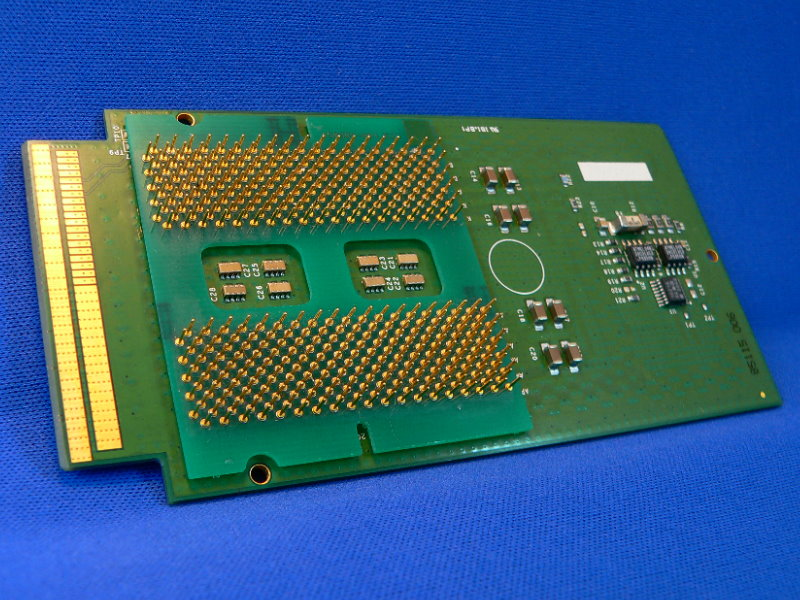 Itanium cpu照片